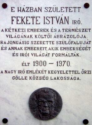 Szülőház emléktábla, saját kép